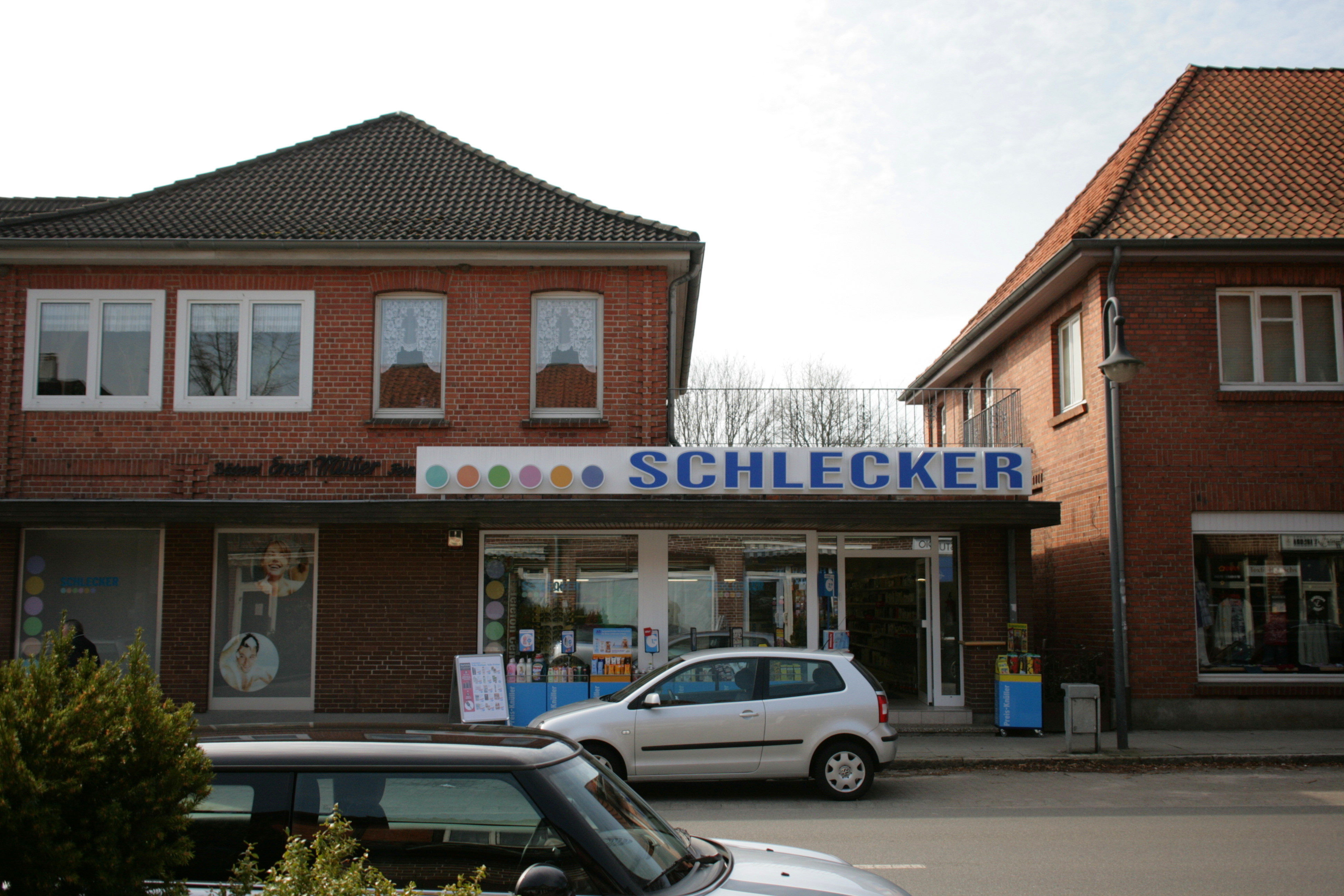 Bahnhofstraße in Bienenbüttel